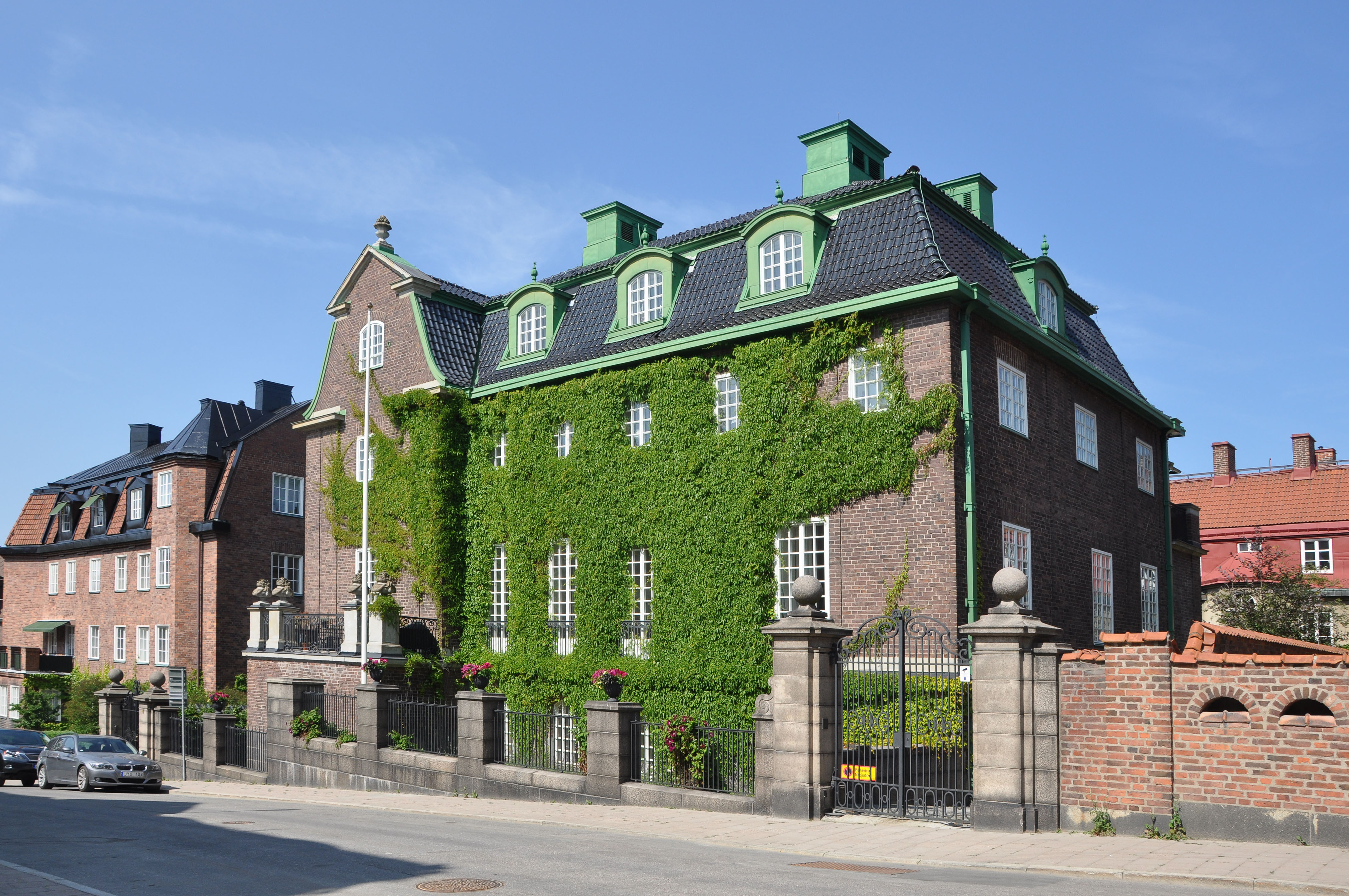 Bragevägen 4 (Sidensvansen 7), Stockholm. Byggnadsår 1914-16, arkitekt Harald André, anställd på Isak Gustav Clasons kontor, byggherre Bengt Bruno Johansson, byggmästare F Dahl